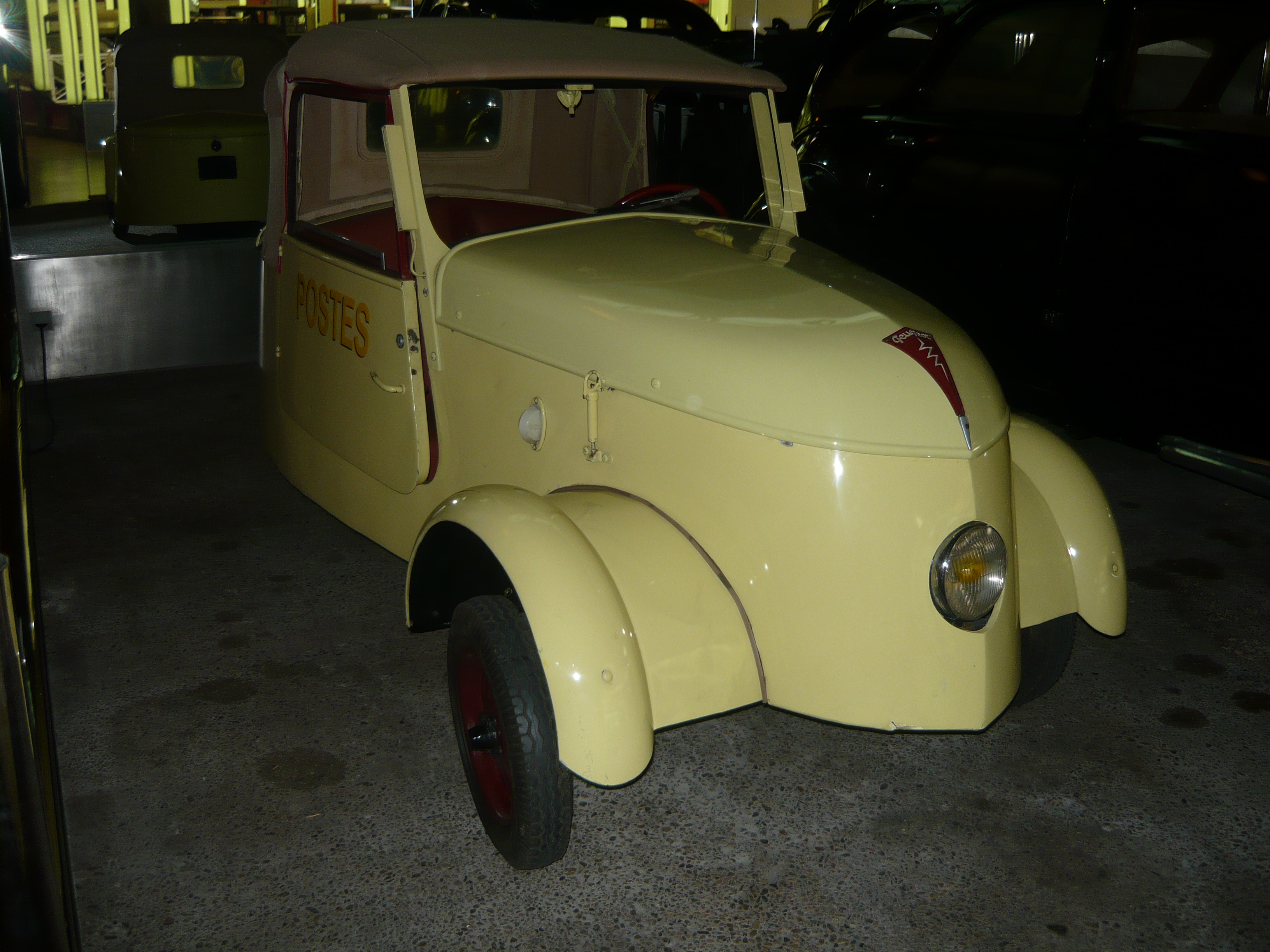 Prototype de la Peugeot VLV électrique (1941-1945)